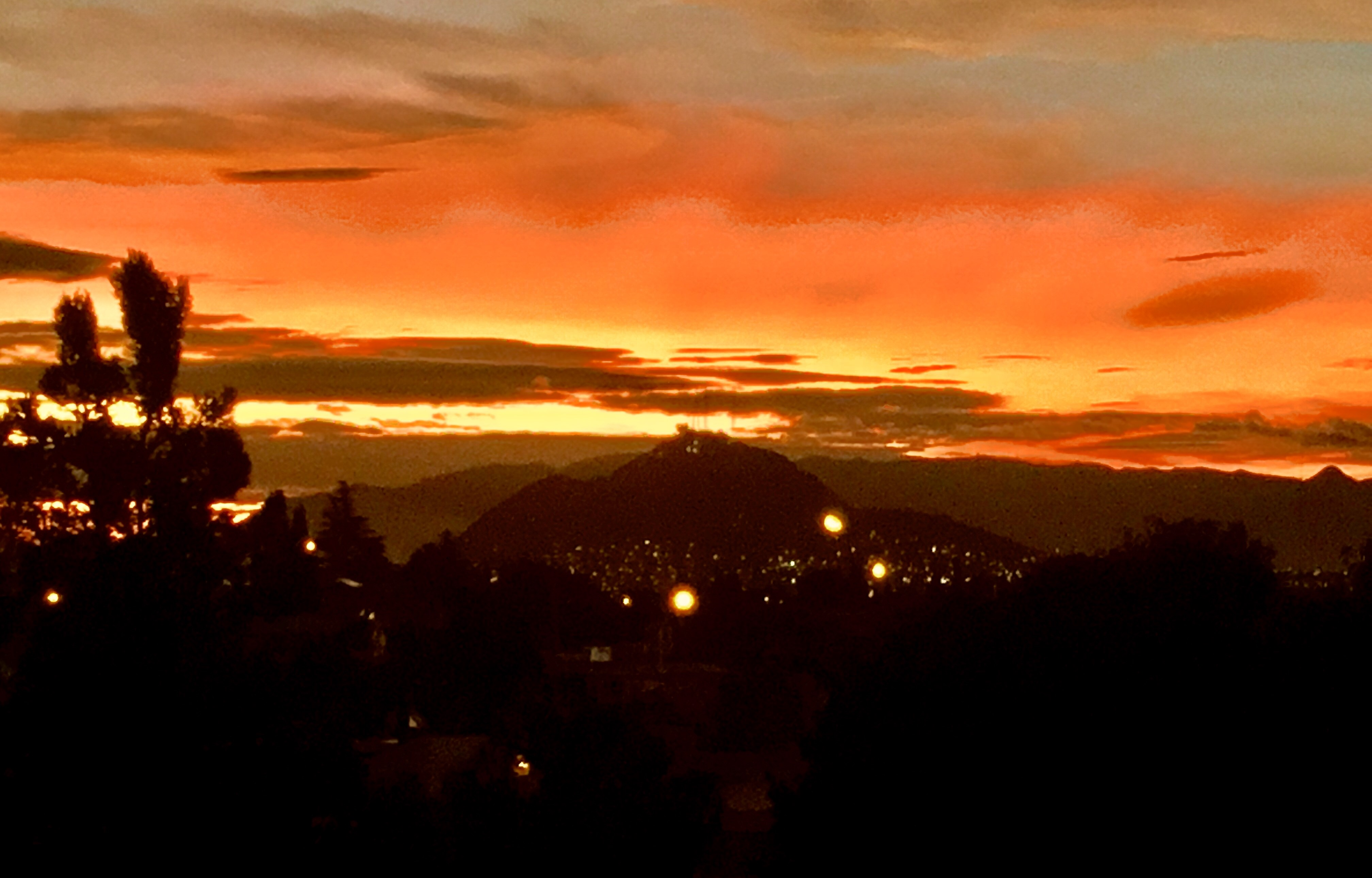 Foto tomada desde el Este de la ciudad. Todos los derechos Alan Olivas